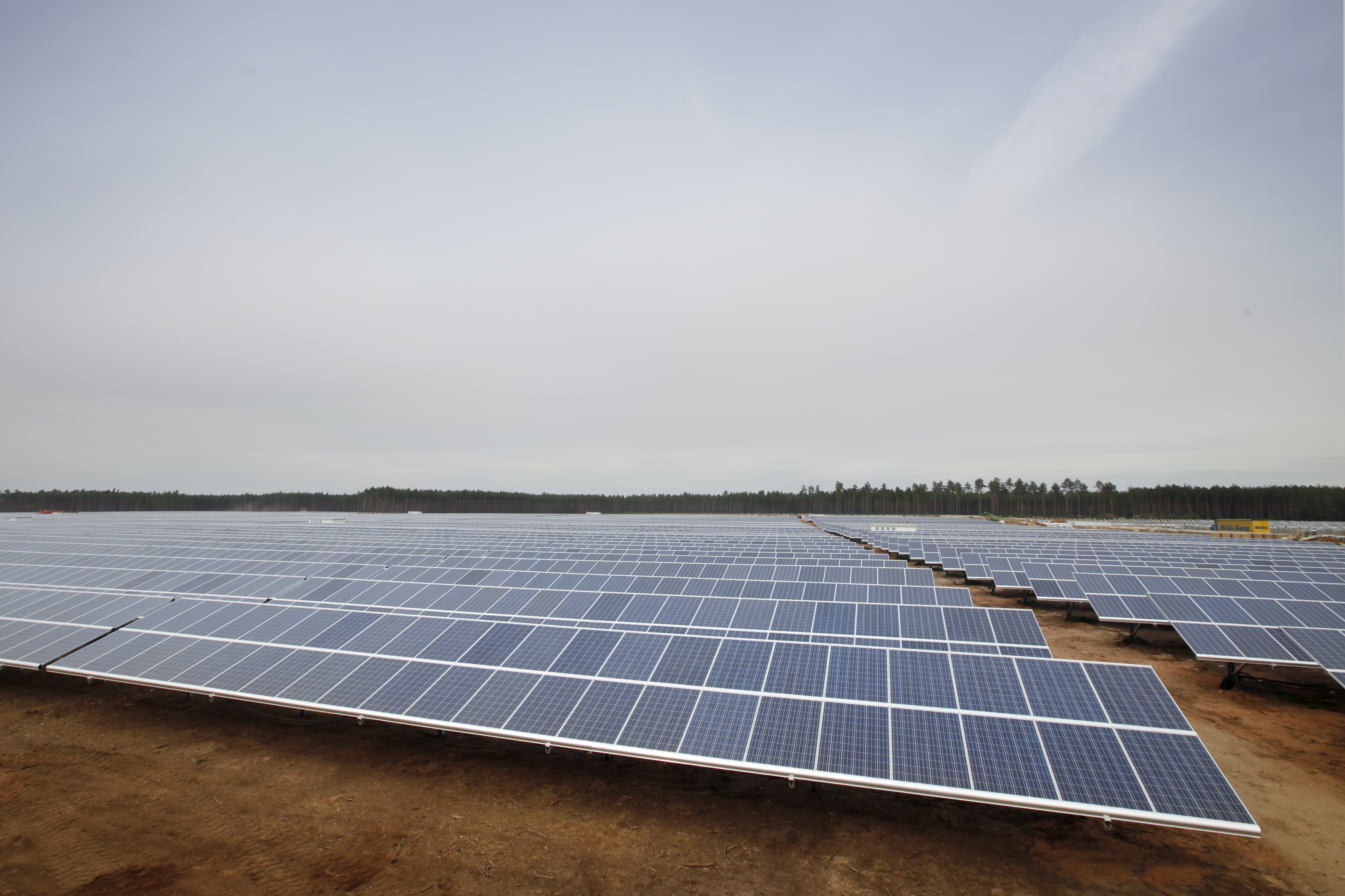 Solarpark Krempendorf